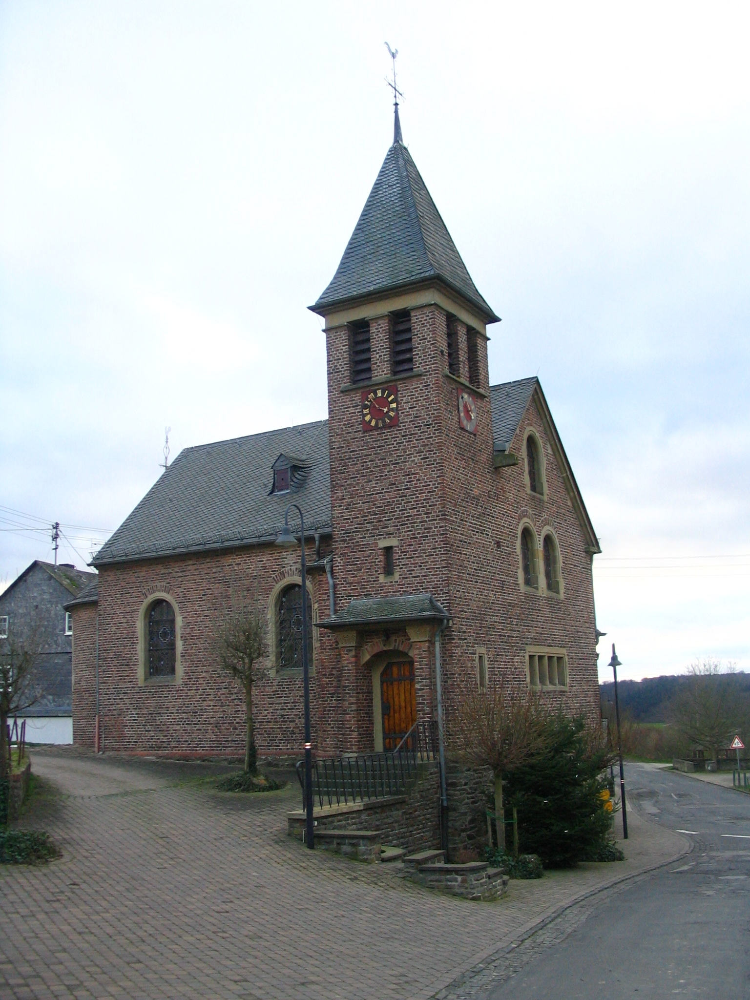 Kapelle Korweiler im Hunsrück